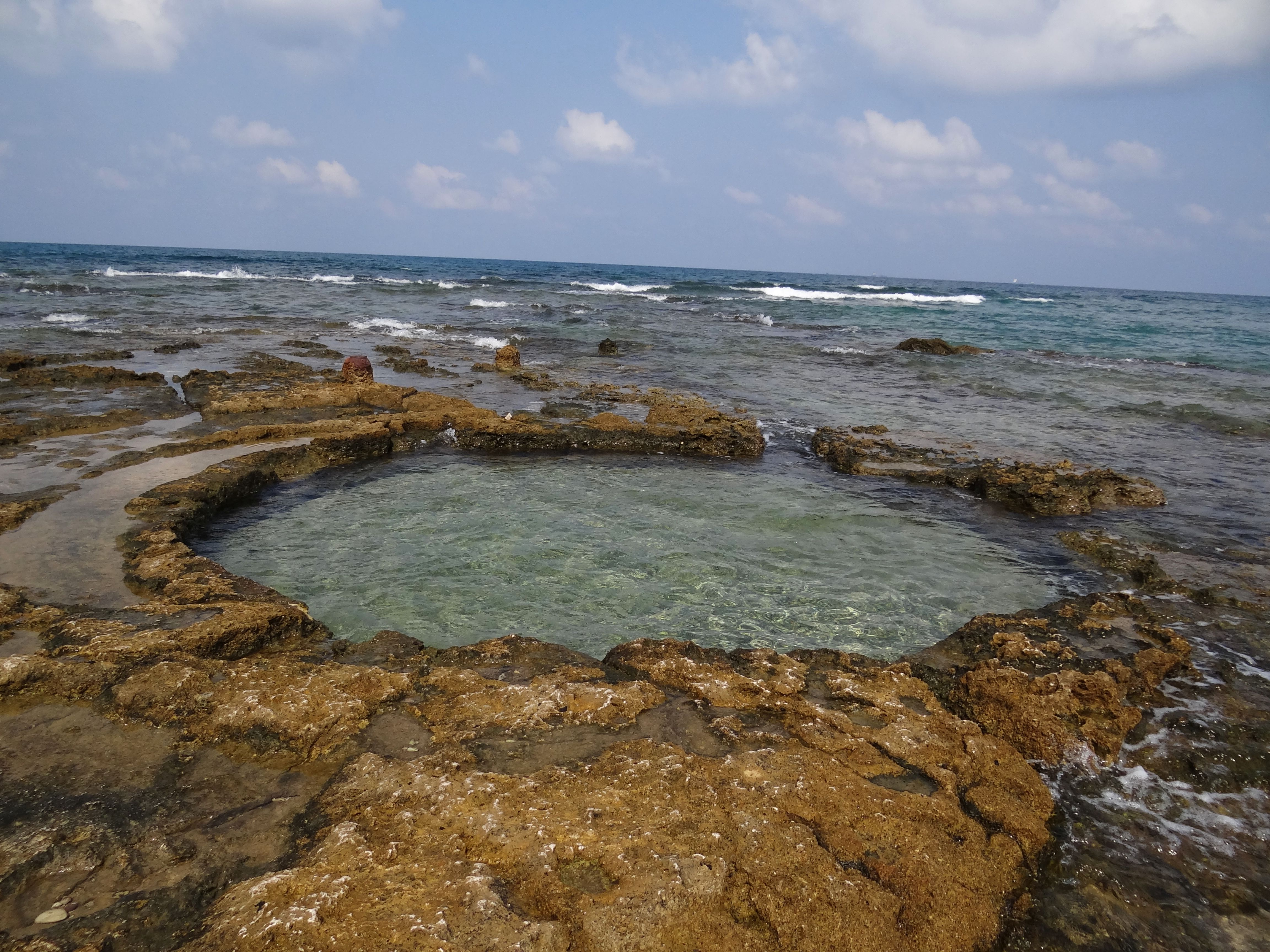 תל קדום השוכן על חוף הים במערב העיר חיפה מול שכונת עין הים, ומדרום לשכונת בת גלים. שטחו של התל כשמונה דונם וגובה הנקודה הגבוהה ביותר בתל לפני התחלת החפירות היה 12.74 מטר מעל פני הים. מקור השם של התל אינו ידוע, אולם מקובל לחשוב שמקור השם נגזר מעץ השקמה, או מעץ התות השחור (Morus nigra), שהובא לאזור מאירן ופריו נקרא Sycamina ביוונית. בתאריך 26 באוקטובר 2008 הוכרזו שמורת טבע שקמונה וגן לאומי שקמונה. התל הוא חלק מהגן המשתרע על שטח של 73.3 דונם, ונמצא בתוך השמורה המשתרעת על שטח של 1,677 דונם. מתקן תעשייתי בתוך המים ממערב לתל